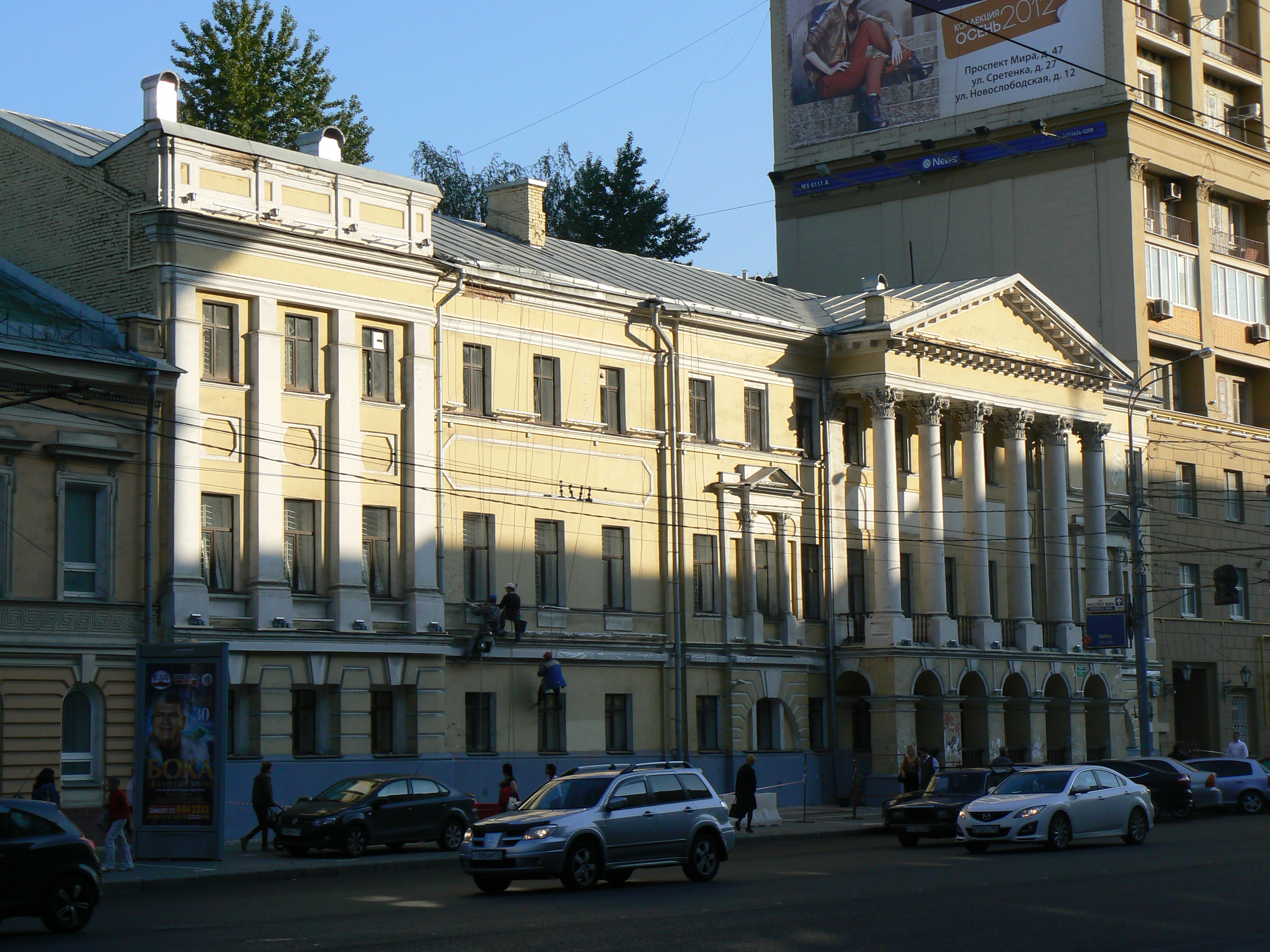 Дом Набилкова. Москва, ул. Проспект Мира, 50. Здание конца XVIII — начала XIX вв. (архитектор Е. С. Назаров).